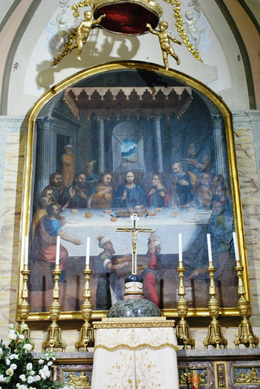 L'Ultima Cena, tela di Giuseppe Carrera (1614)